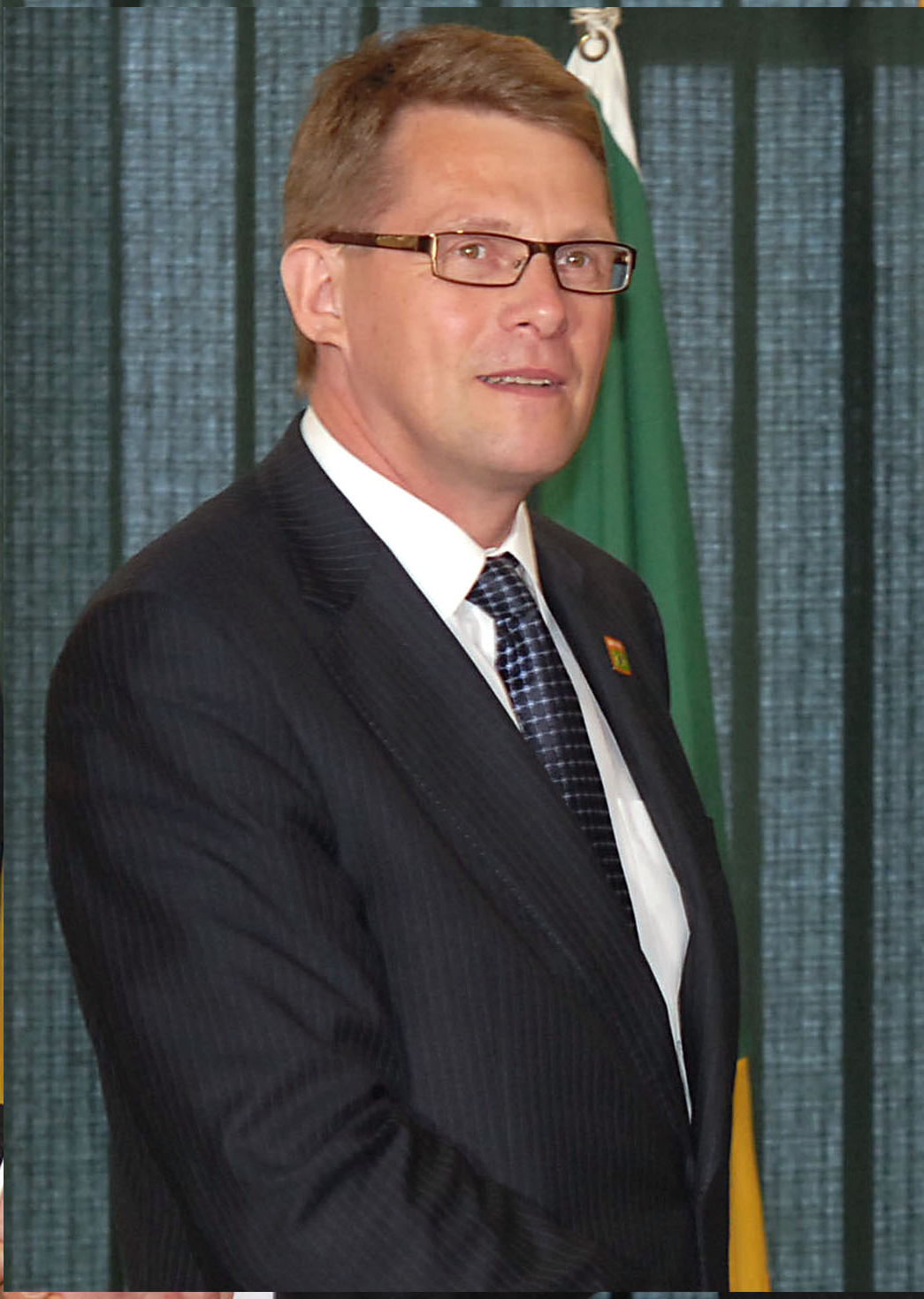 Matti Vanhanen. Foto Adaptada.